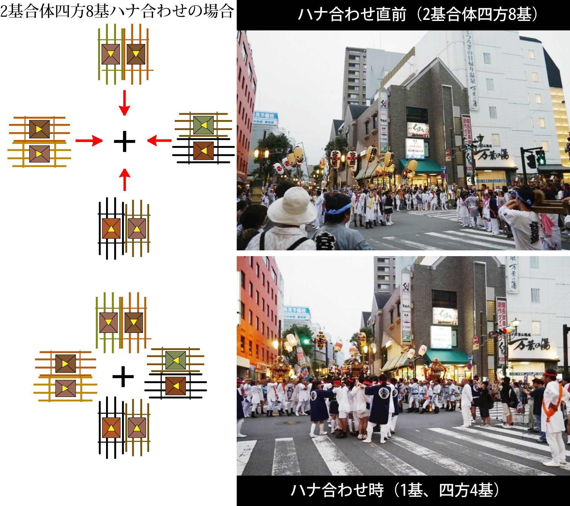 4方向からのハナ（花・鼻）棒合せの解説と写真。